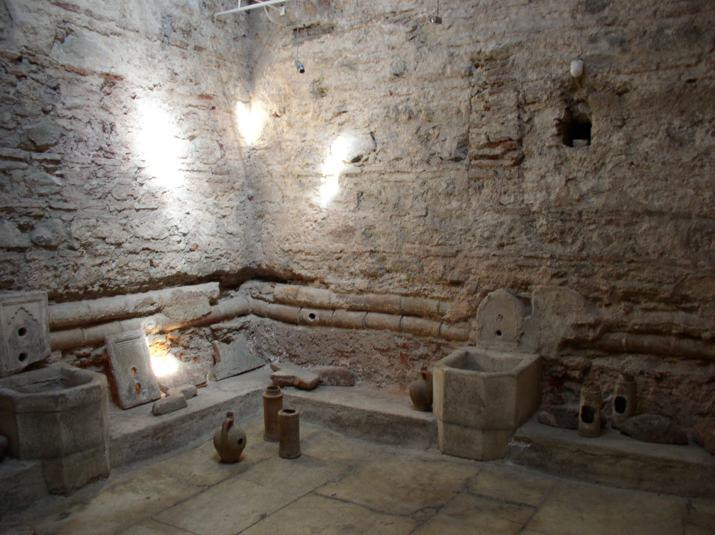 Jedna od prostorija u Čifte hamamu u Skoplju, jedina koja nije pretvorena u galeriju i njene pomoćne prostorije